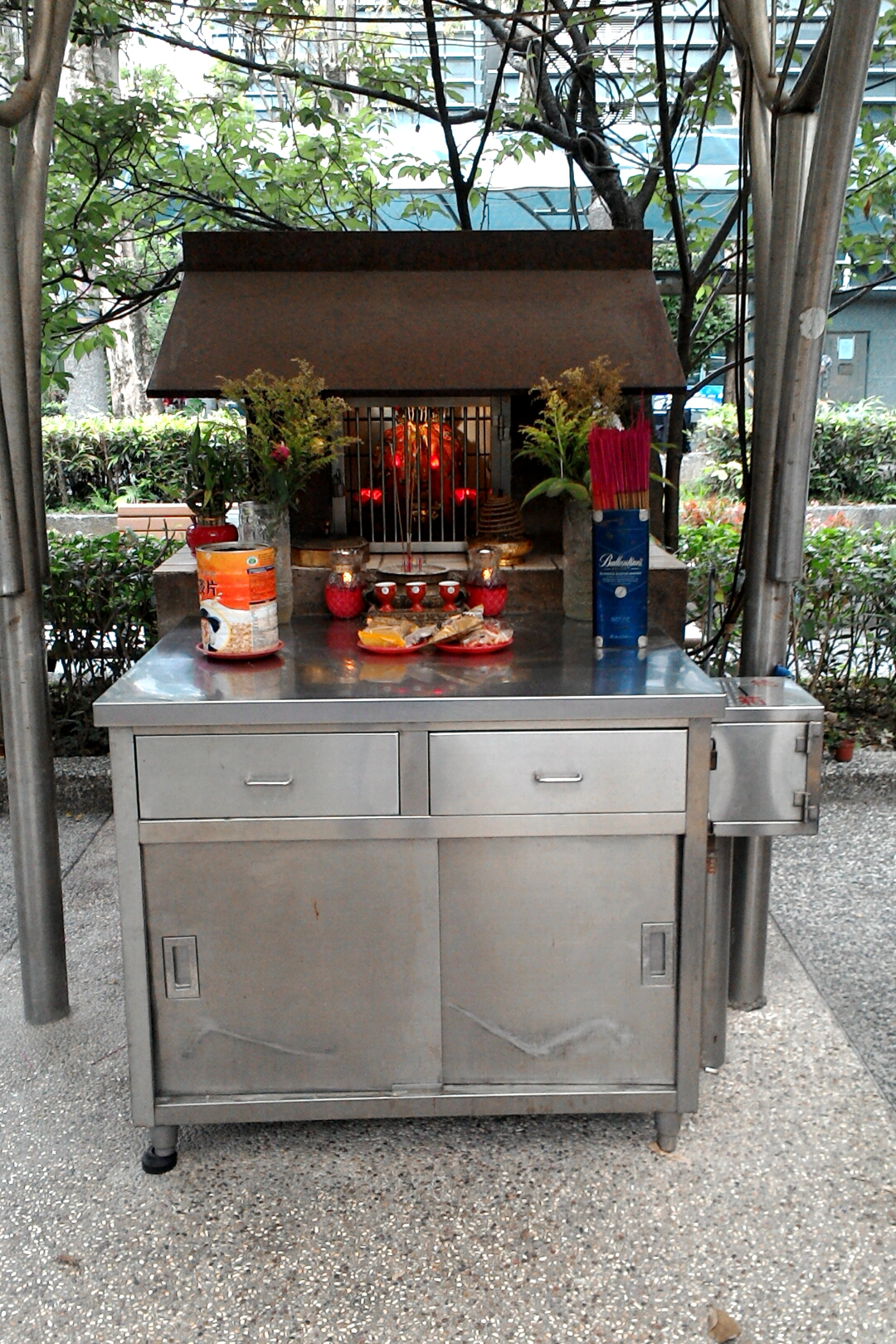 應媽廟廟身,台北市松山區中崙次分區中正里